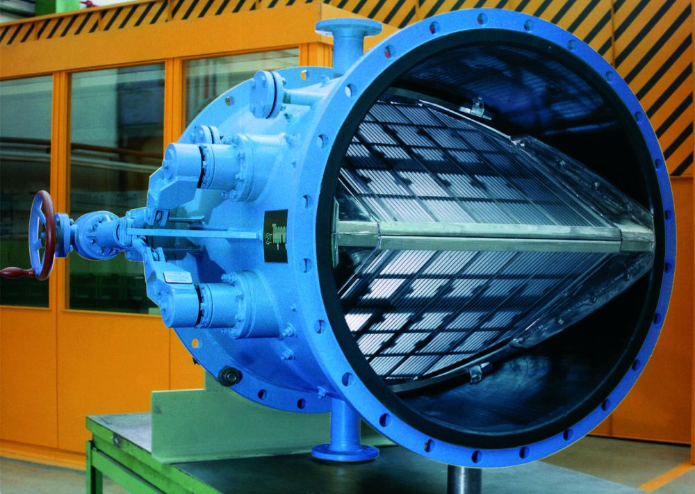 Großsieb zum Einbau in eine Hauptkühlwasserleitung eines Dampfkratftwerkes.